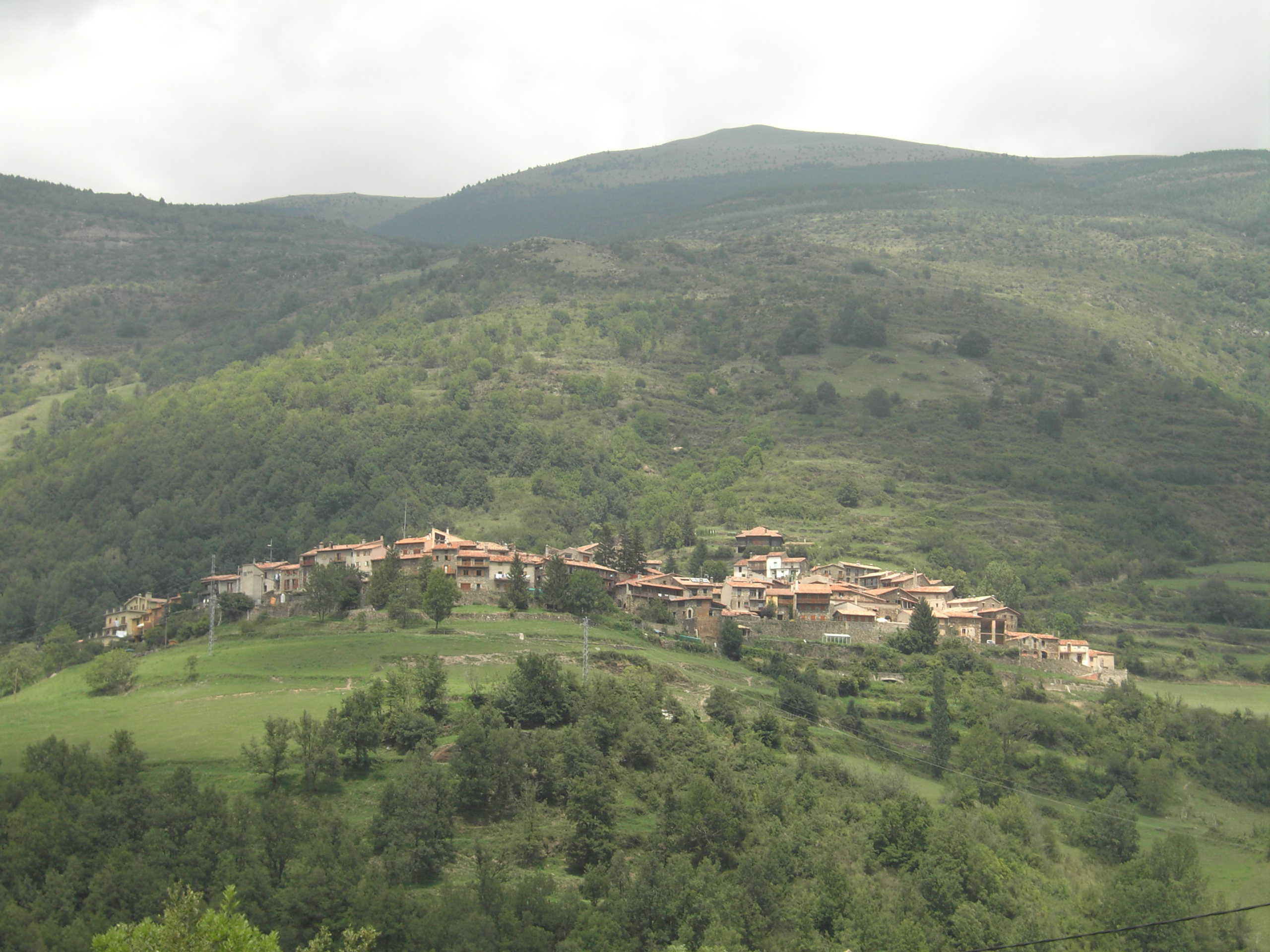 Pardines - Ripollès, Catalonia